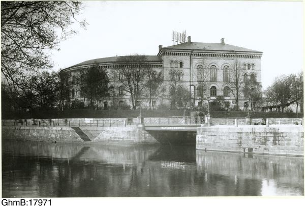 Sahlgrenska sjukhuset vid Grönsakstorget i stadsdelen Inom Vallgraven i Göteborg. Bron är Sahlgrensbron vid Sahlgrensgatan där Västra Hamnkanalen rinner ut i Vallgraven.